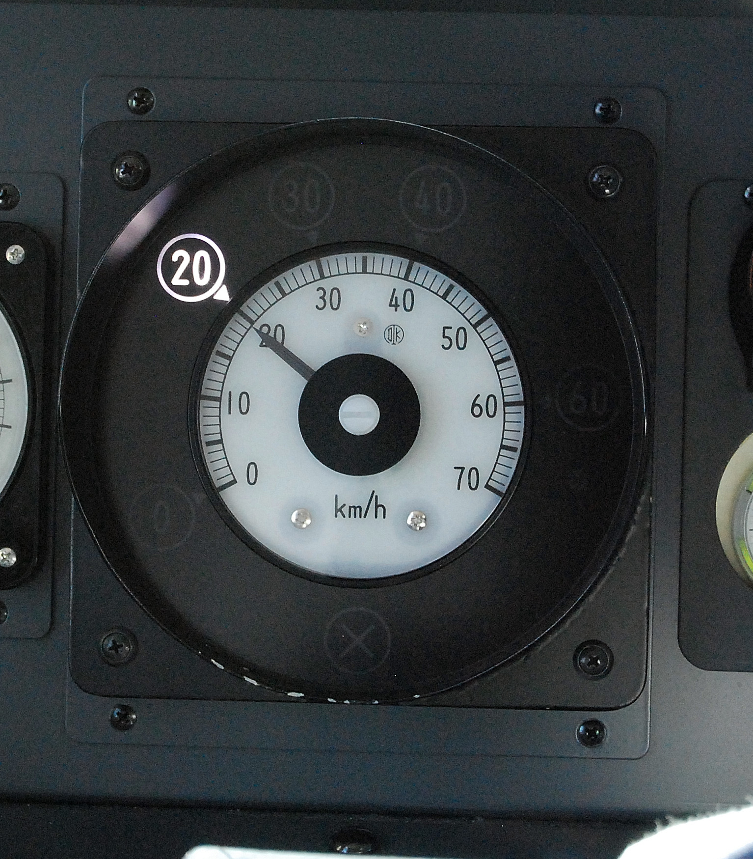 埼玉新都市交通伊奈線の車両の運転席に設置された多段ブレーキ制御方式のATCの車内信号（乗務員室の窓越しから撮影）